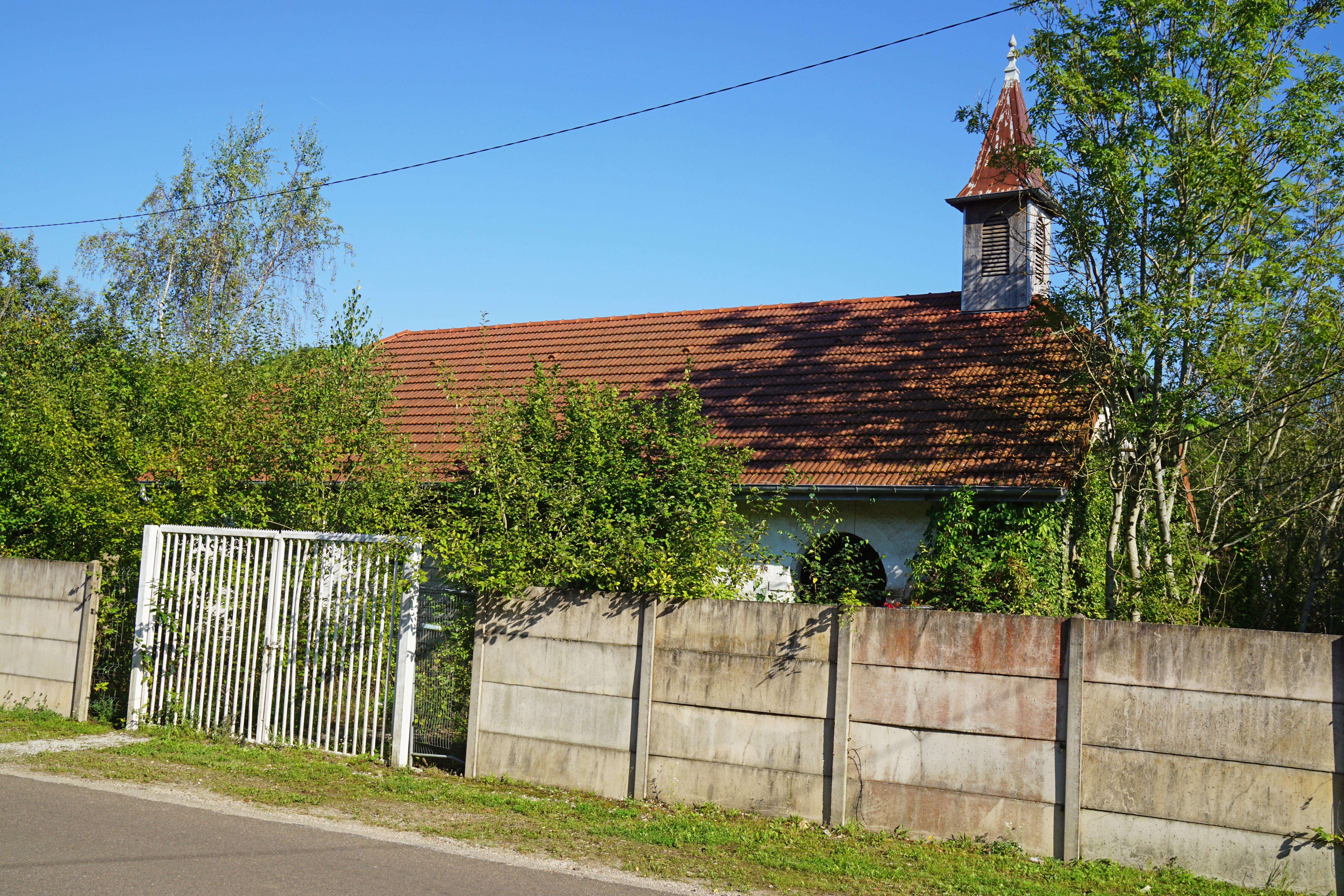 Ancienne fonderie de Fallon (Haute-Saône).